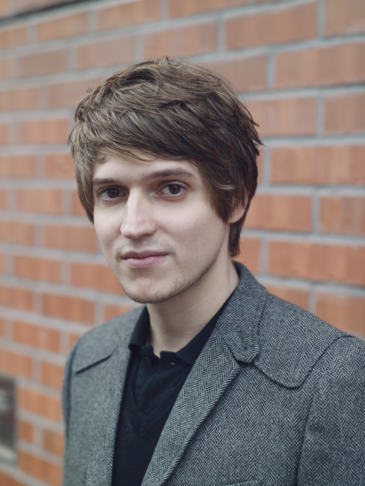 Frei benutzbares Foto des Schriftstellers Benedict Wells